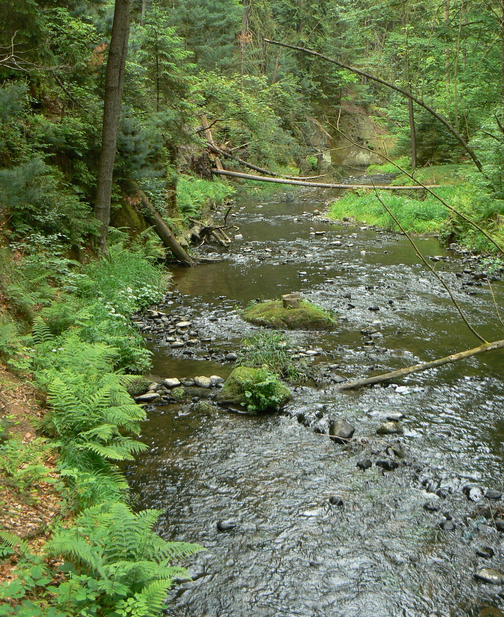 Pavlino údolí - kaňonovité údolí Chřibské Kamenice, okres Děčín, Česko